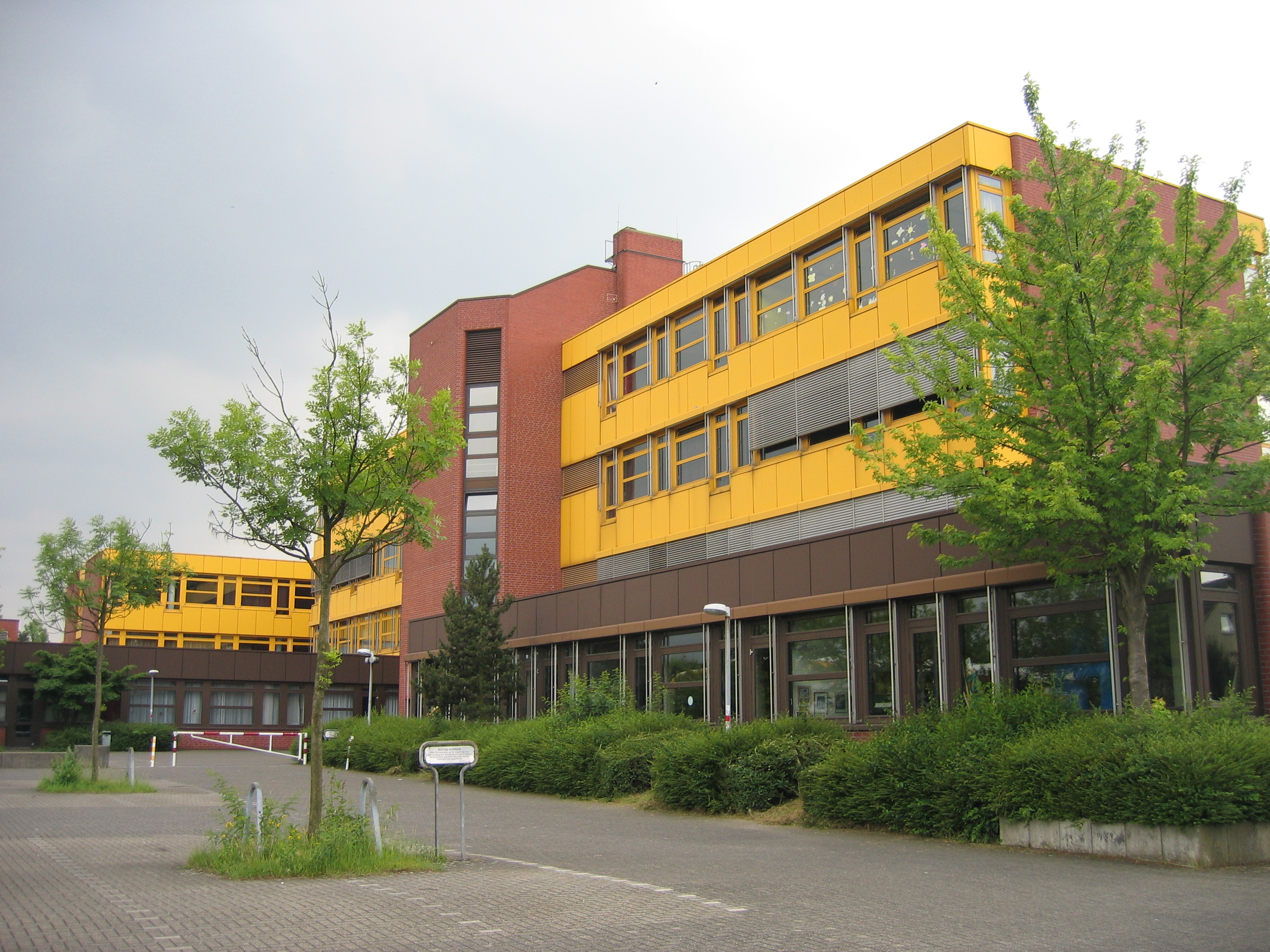 Städtisches Schulzentrum (Hauptschule+Gymnasium) in Köln-Pesch